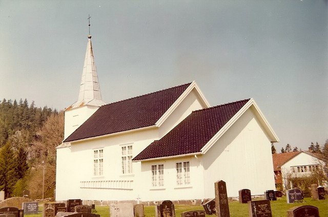 Hvarnes kirke